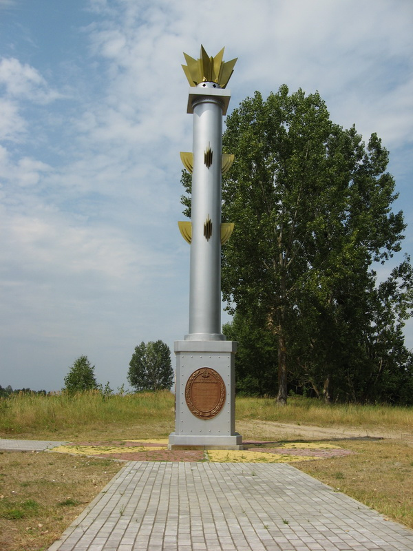 Селішча. Дняпроўска-Бугскі канал. Водападзел басейнаў рэк Дняпра і Віслы. Памятны знак устаноўлены ў 2009 годзе. Рэспубліканскім унітарным эксплуатацыйна-будаўнічым прадпрыемствам "Днепа-Бугскі водны шлях" у гонар старажытнага беларускага воднага шляху, які стагоддзямі злучае народы Усходу і Захаду